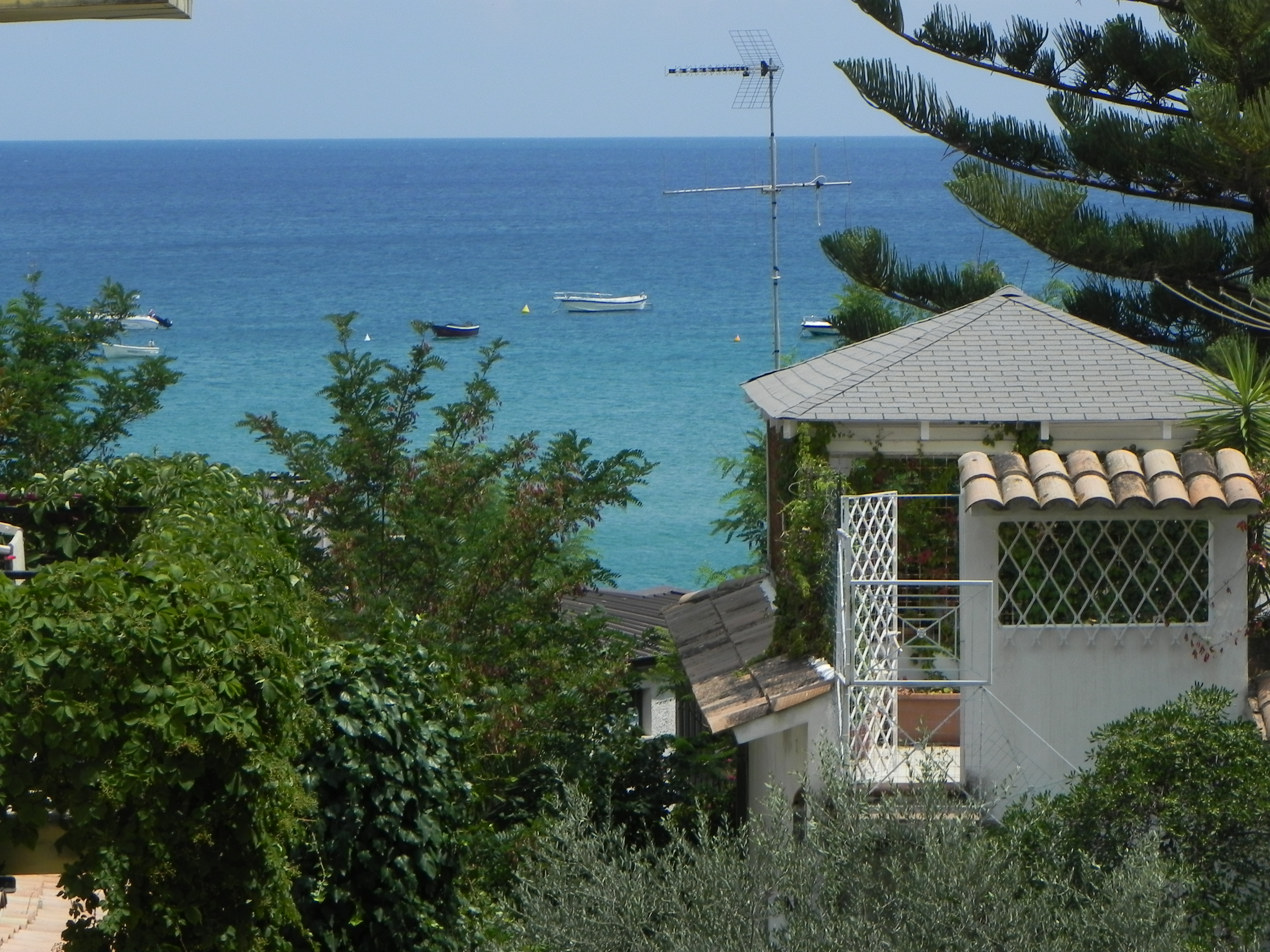 La prima villa costruita